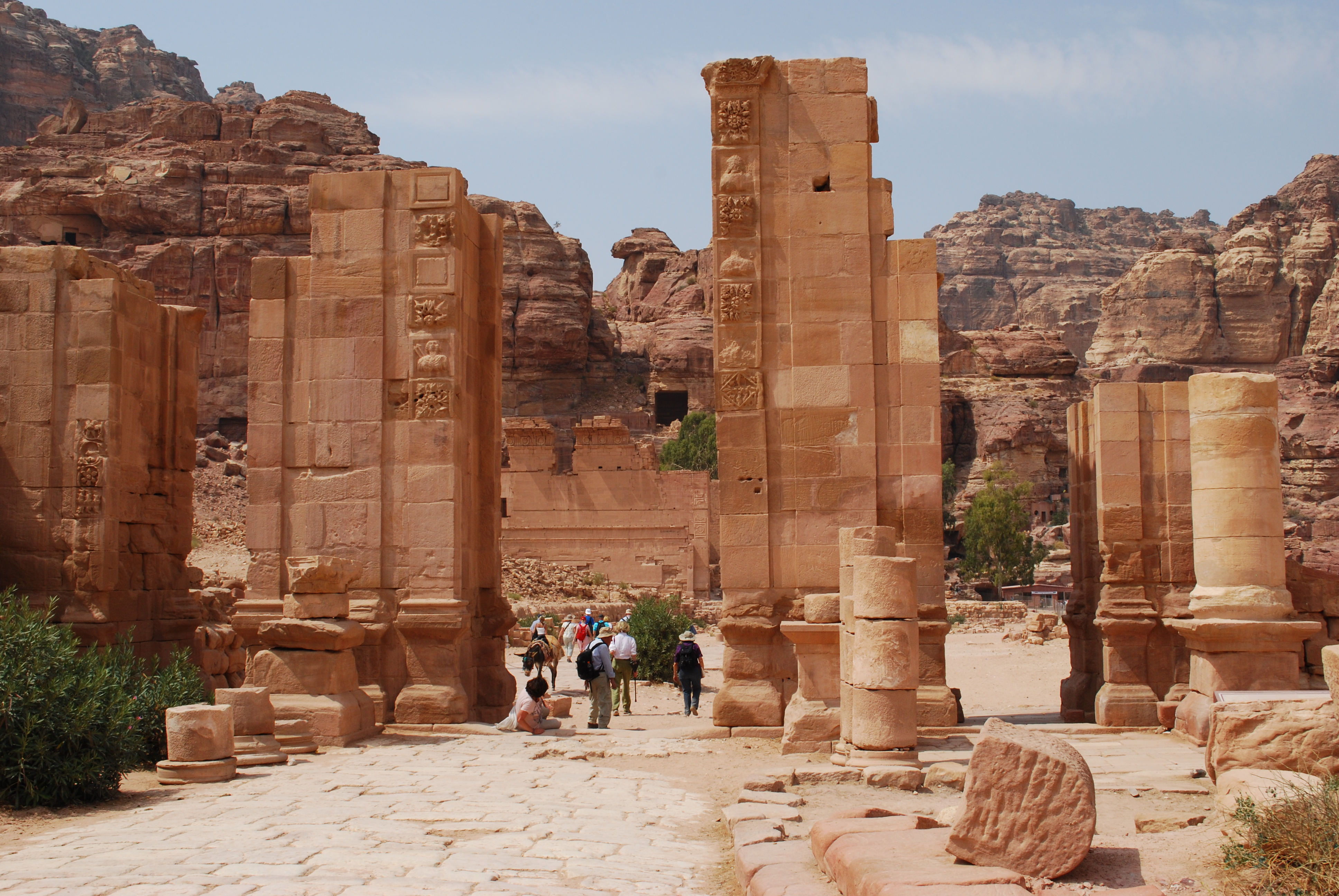 La porte d'Hadrien sur le cardo maximus à Pétra.